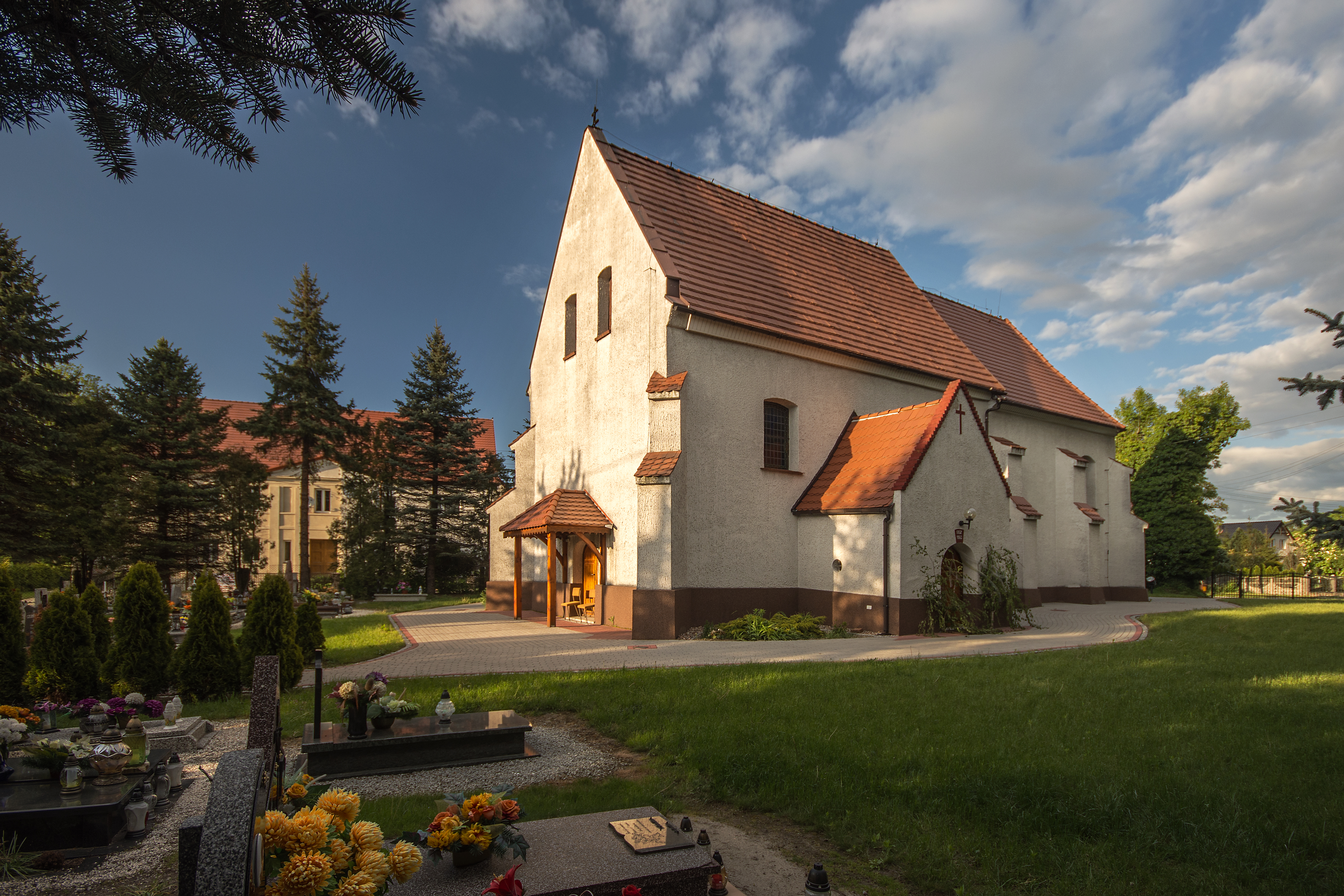 Strzeganowice 22, kościół p.w. św. Stanisława, XIV, XV, XVIII, 1854